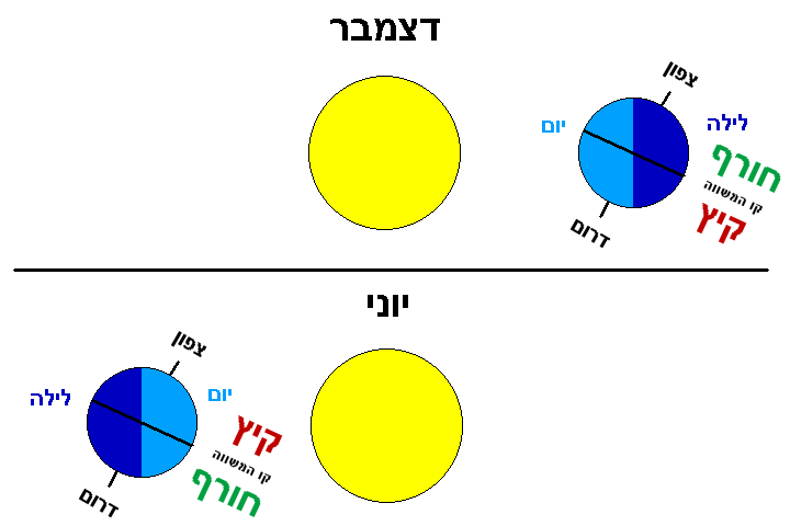 מצב כדור הארץ והשמש ביום הארוך ביותר והקצר ביותר